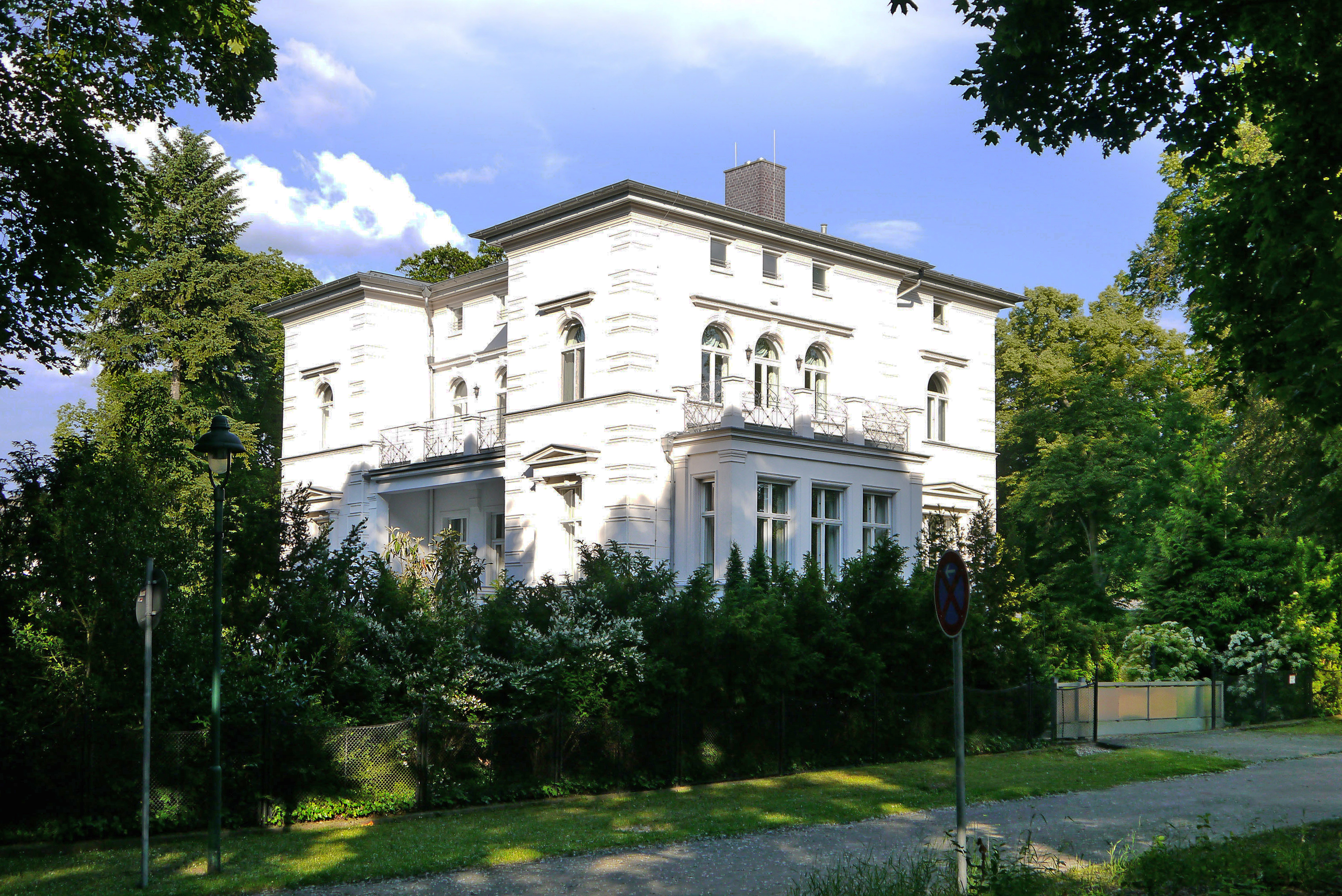 Baudenkmal: Max-Sabersky-Allee 22, Teltow, Sabersky-Villa